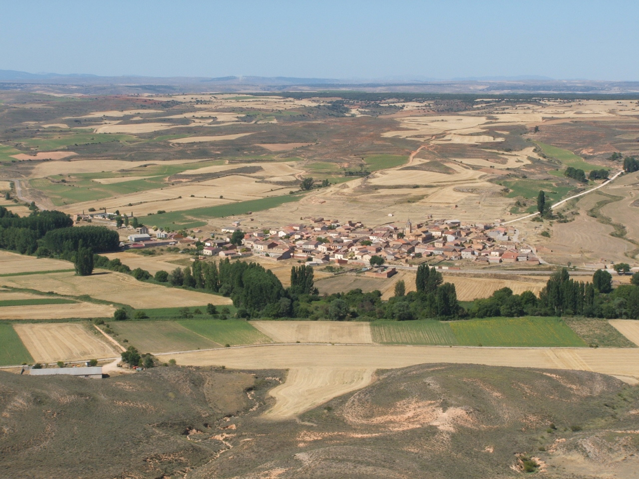 Vista del pueblo de Caltojar (Soria) desde el Llano.